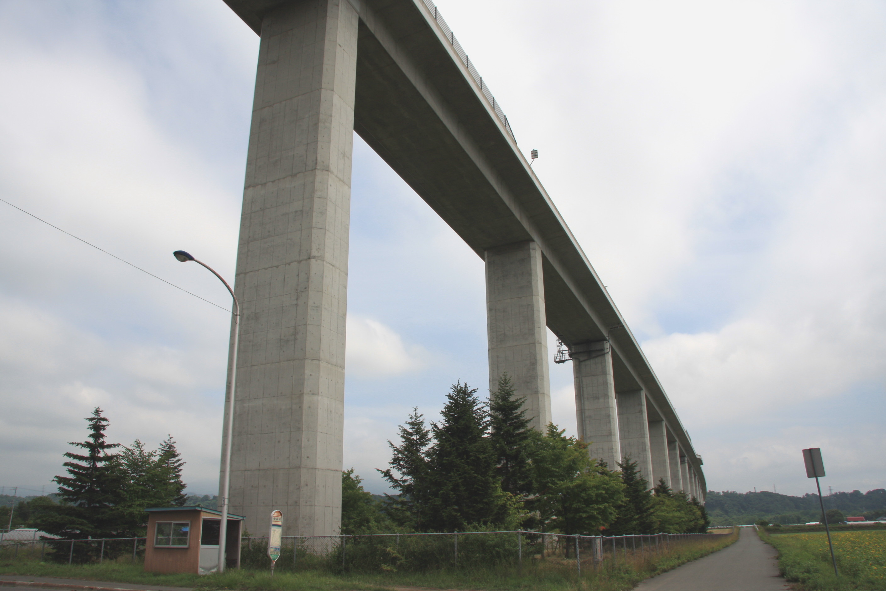 国道453号線上の長流川橋